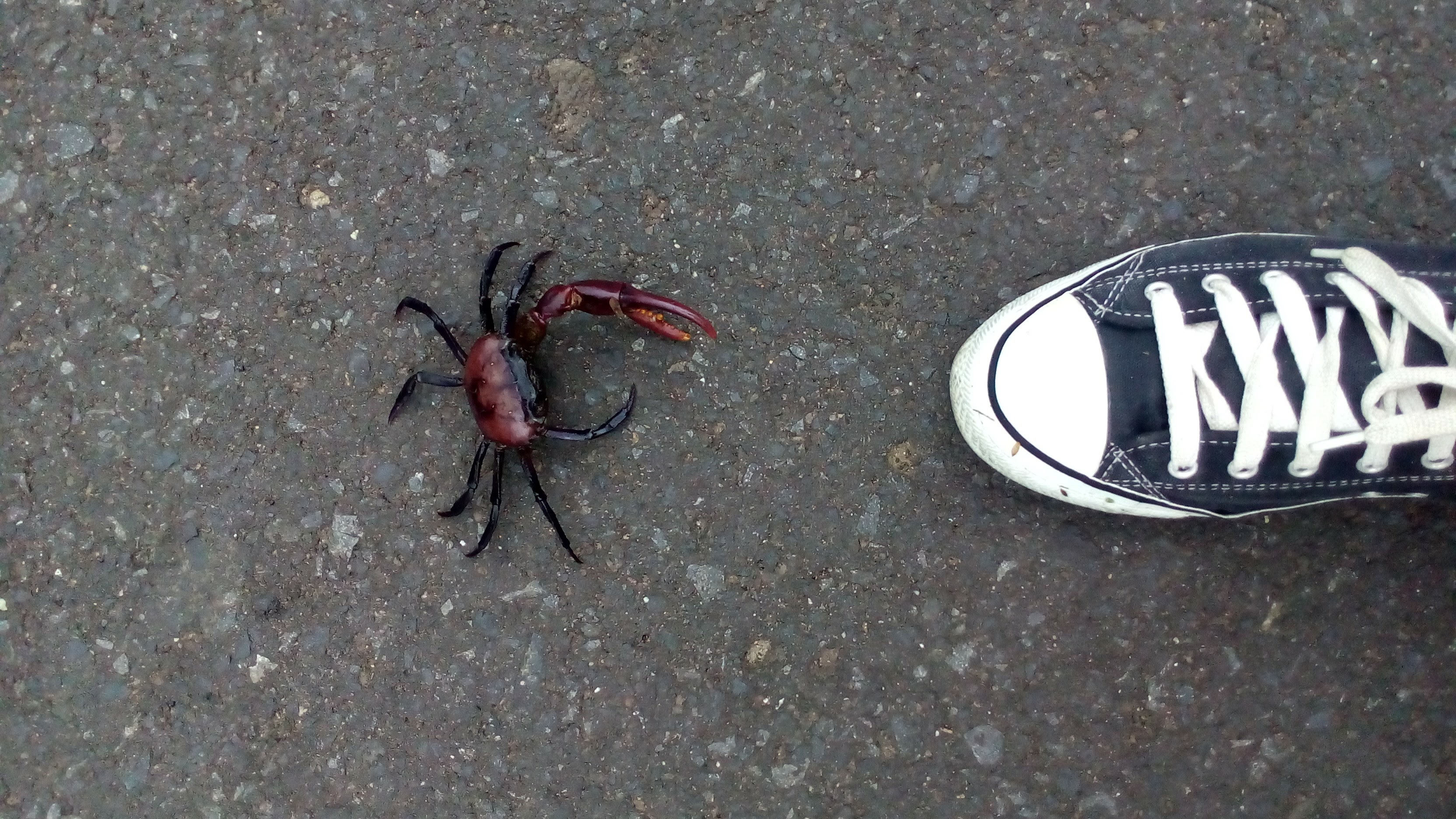 Esanthelphusa в місті Убон Ратчатхані